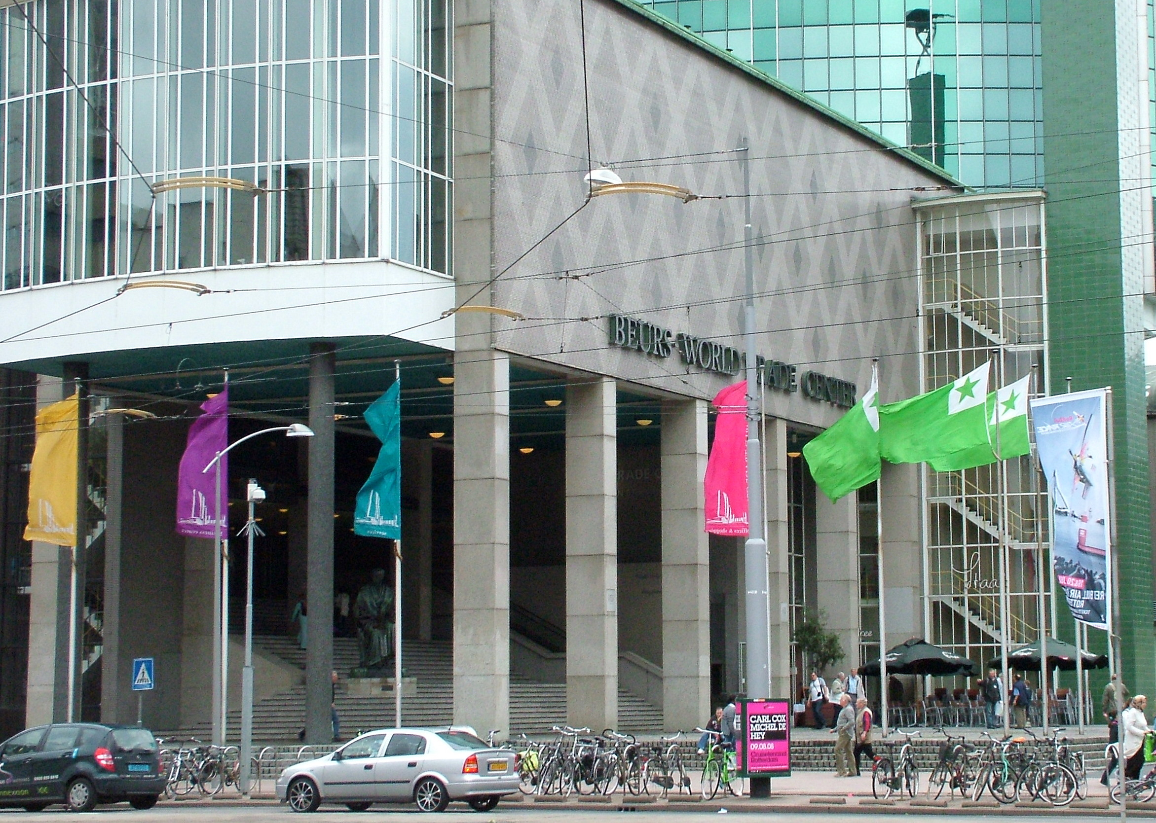 Universala Kongreso de Esperanto, Roterdamo 2008. Kongresejo "Beurs WTC Rotterdam".